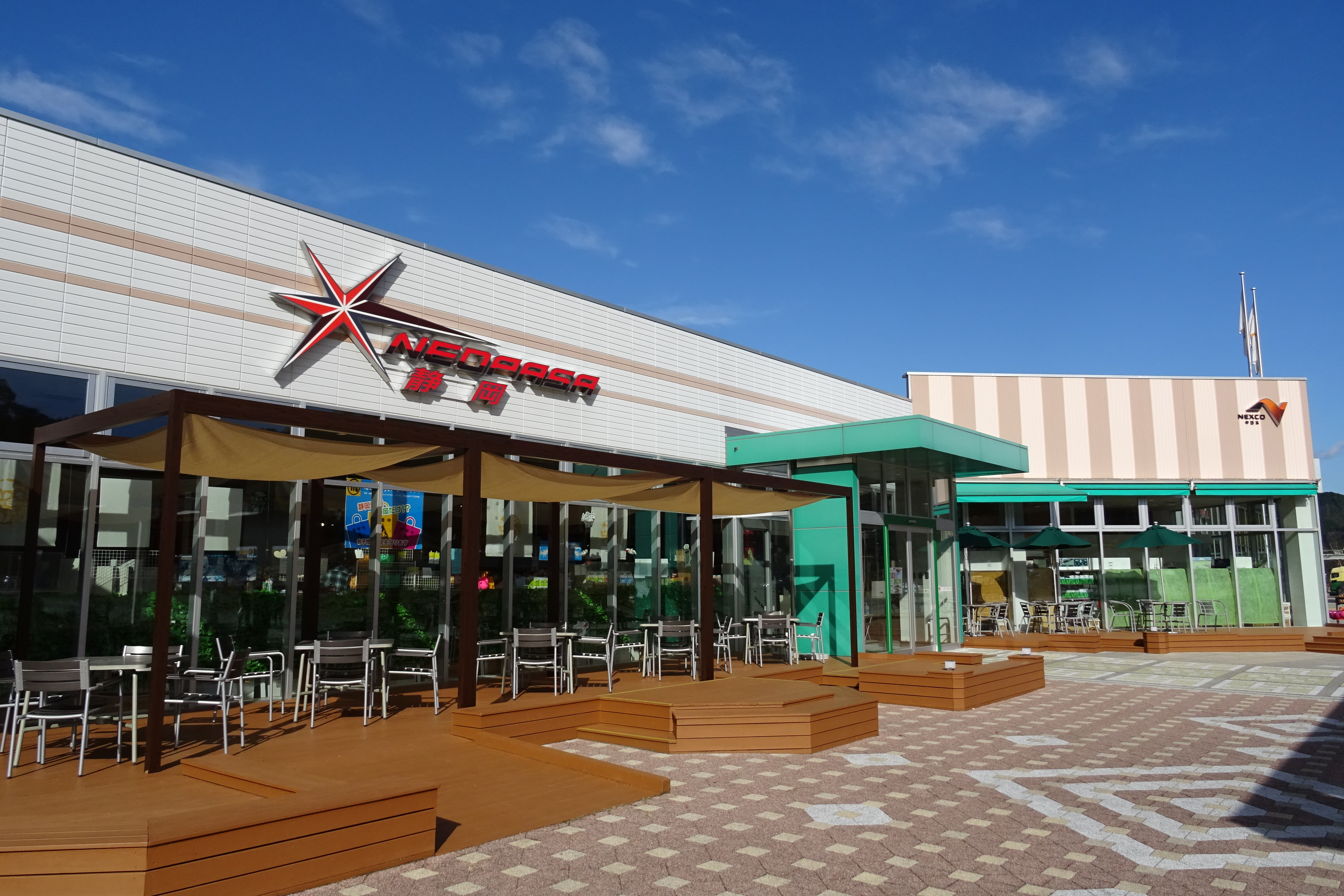 静岡サービスエリア上り